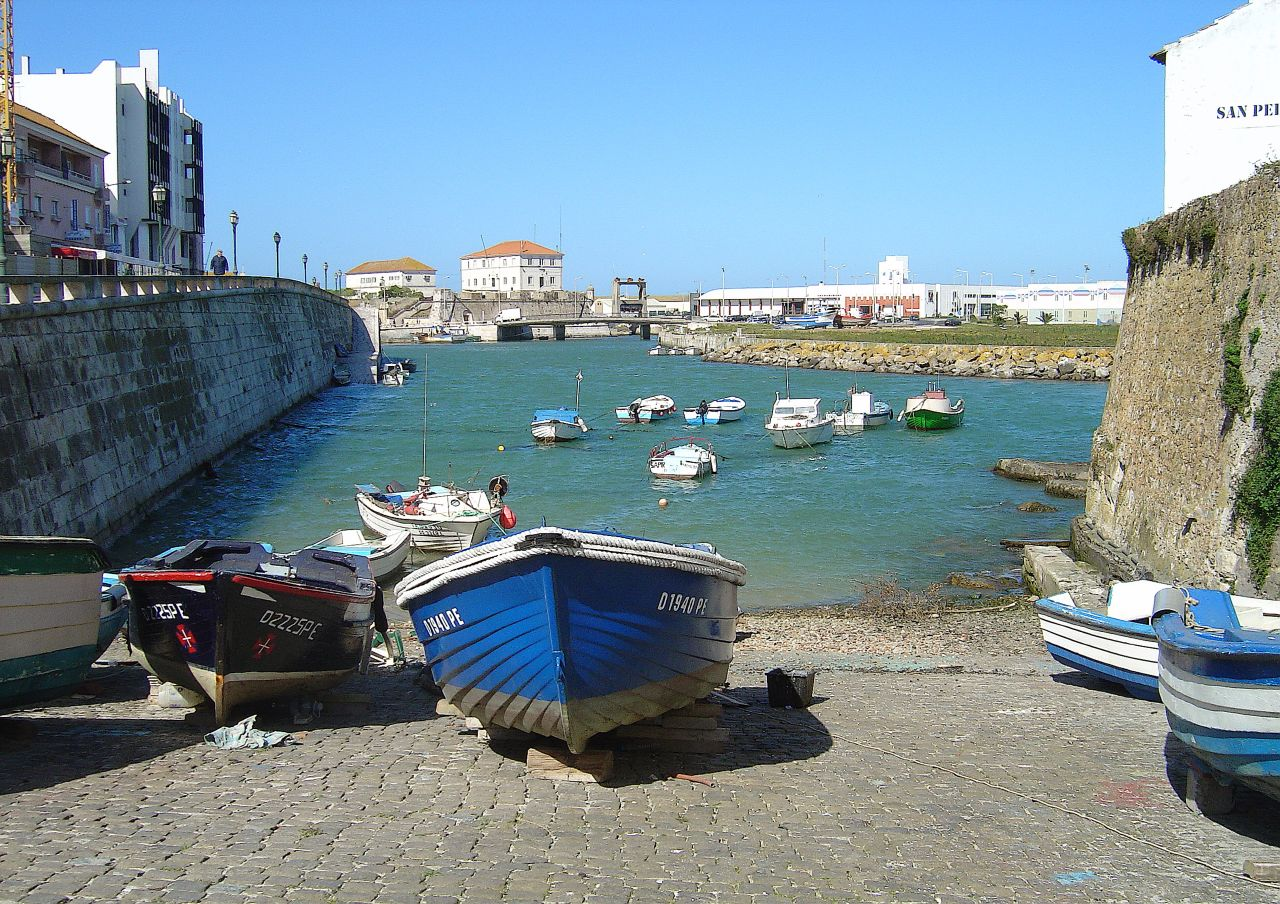 Doca de Peniche (Portugal)